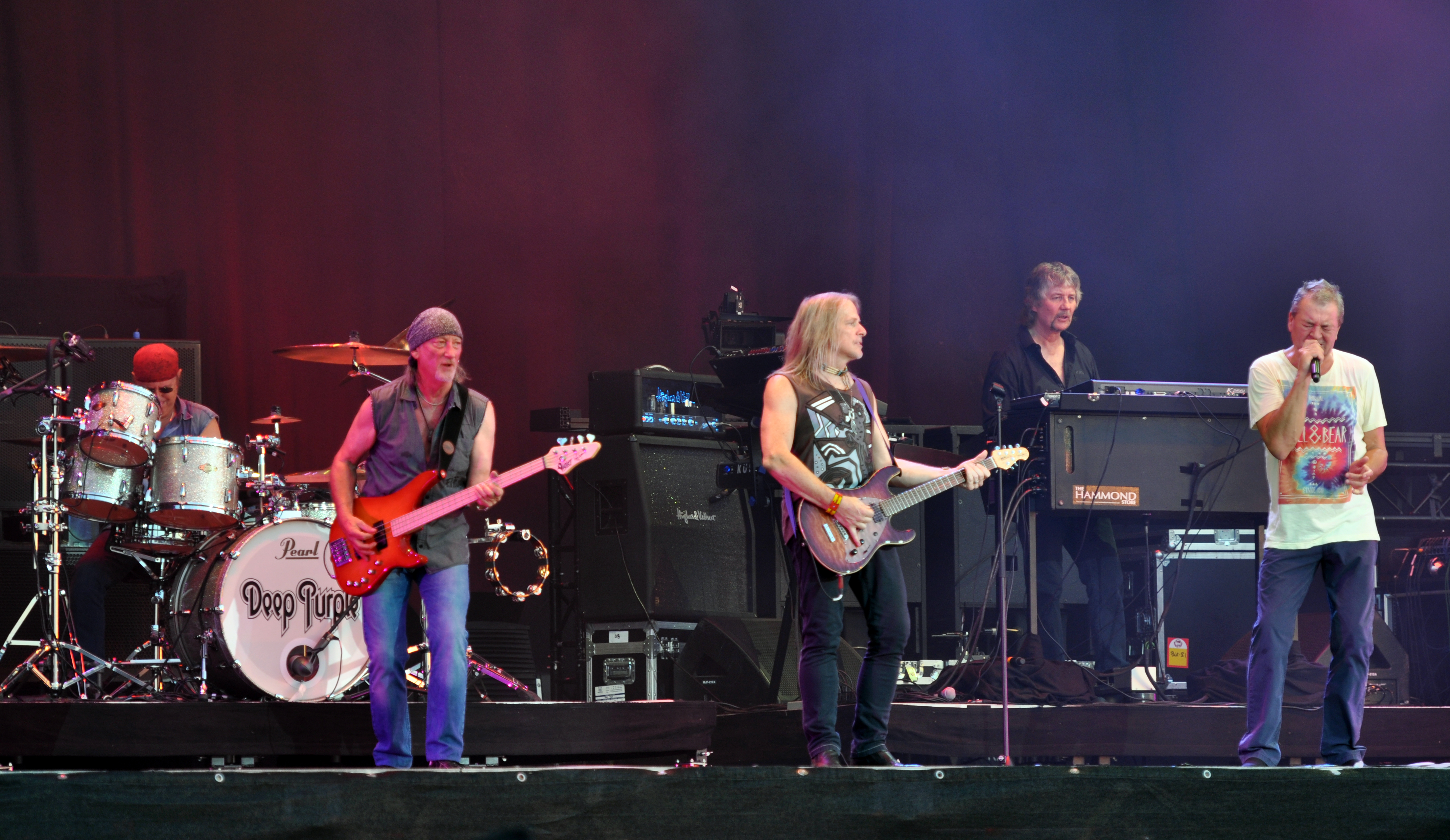 Deep Purple at Wacken Open Air 2013